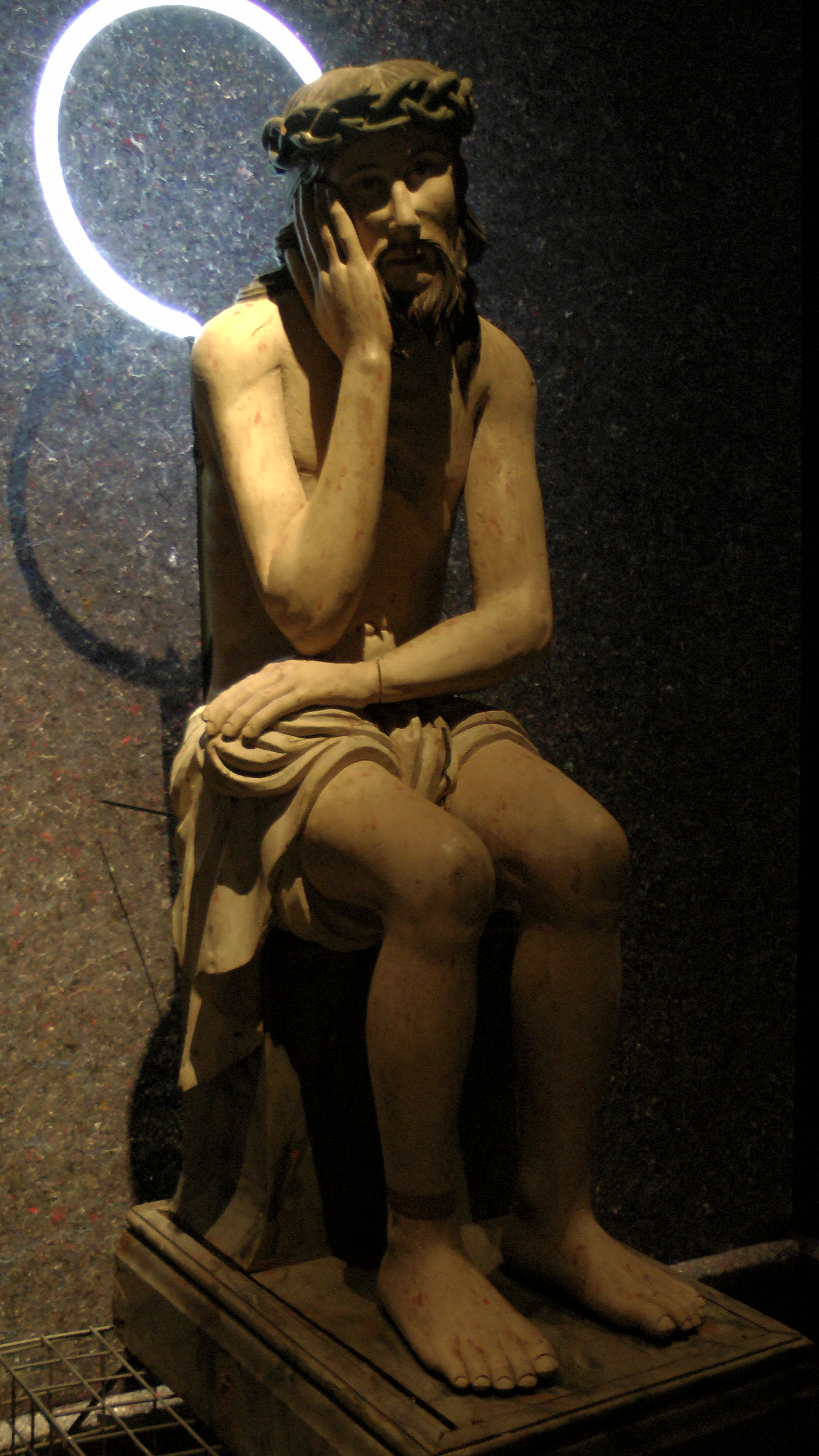 Христос в темнице. Тотемское музейное объединение. XVII век. Дерево, левкас, темпера, резьба, роспись. Фотография сделана 16.01.2019 на выставке "Христос в темнице" в Санкт-Петербурге.